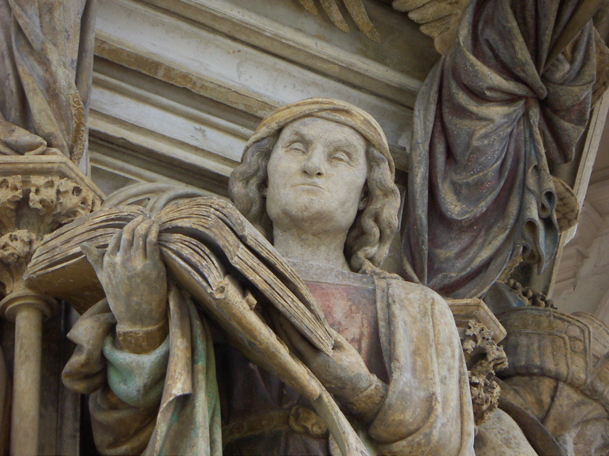 Puits de Moise, Dijon